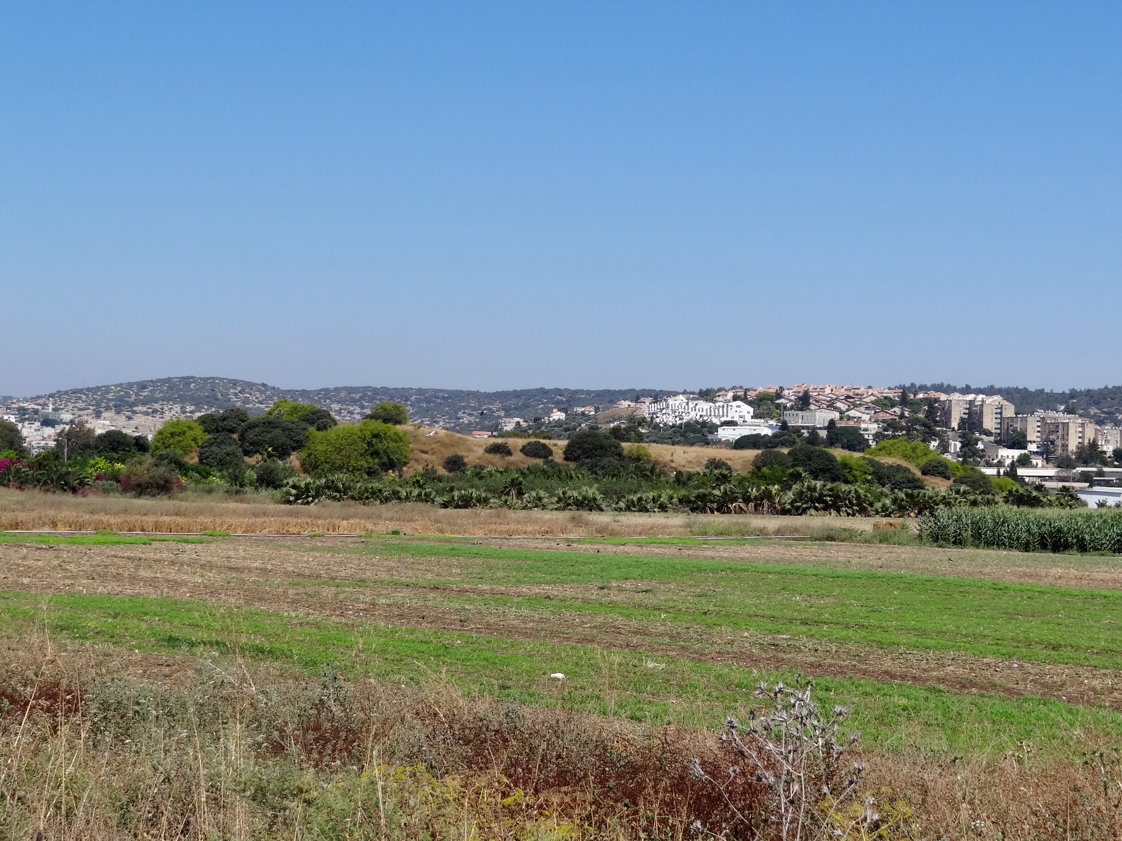 Tel lRegev, Archaeology site ןמ Zvulun Valley on north of Israel תל רגב, התל שוכן בעמק זבולון בכניסה לכפר חסידים מבט מכיוון כביש 75